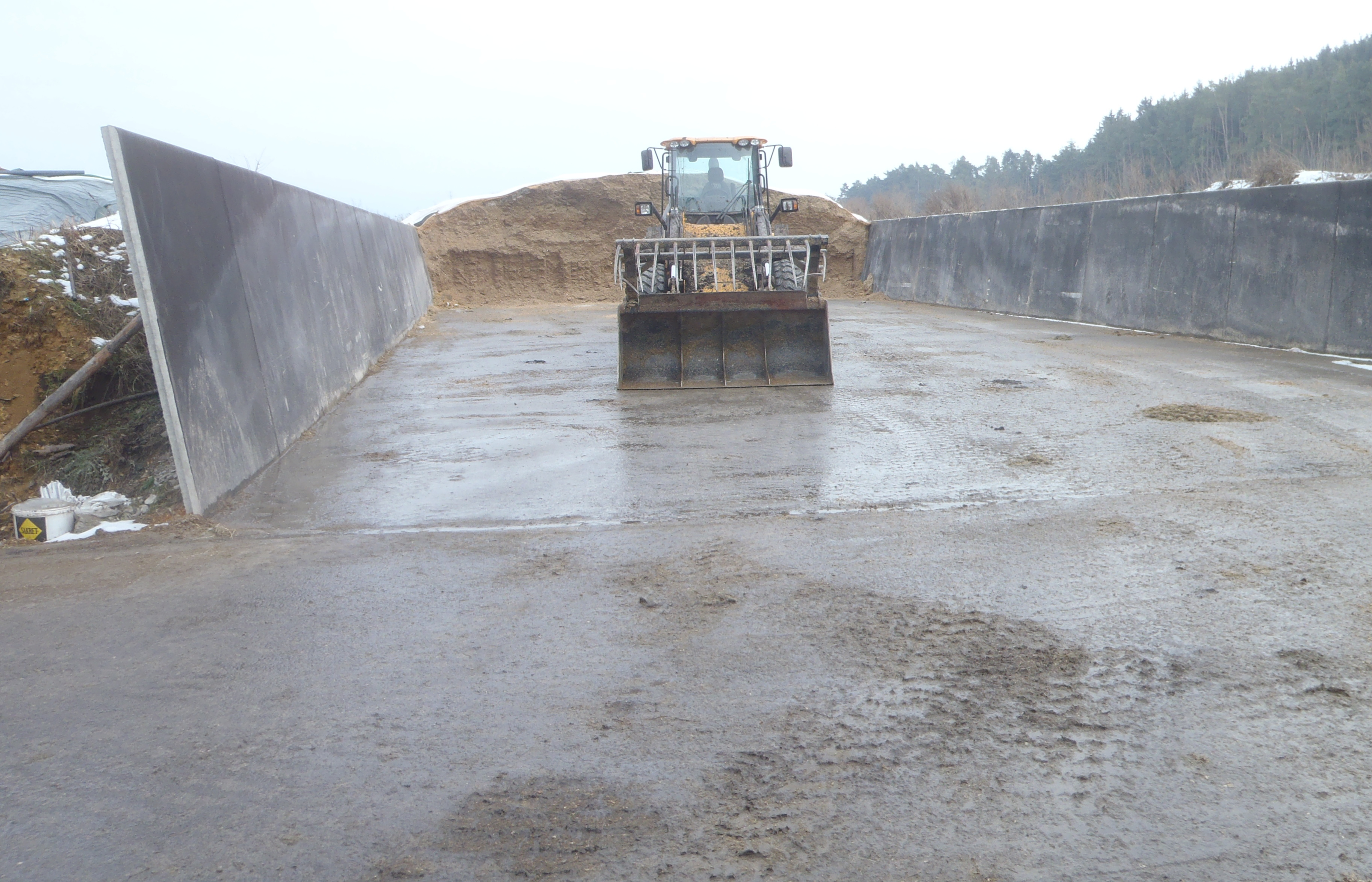 Ein Radlader in einem Fahrsilo mit Beton-Bodenplatte und Seitenwänden; hinter dem Fahrzeug ist die noch gelagerte Silage-Restmenge sichtbar.